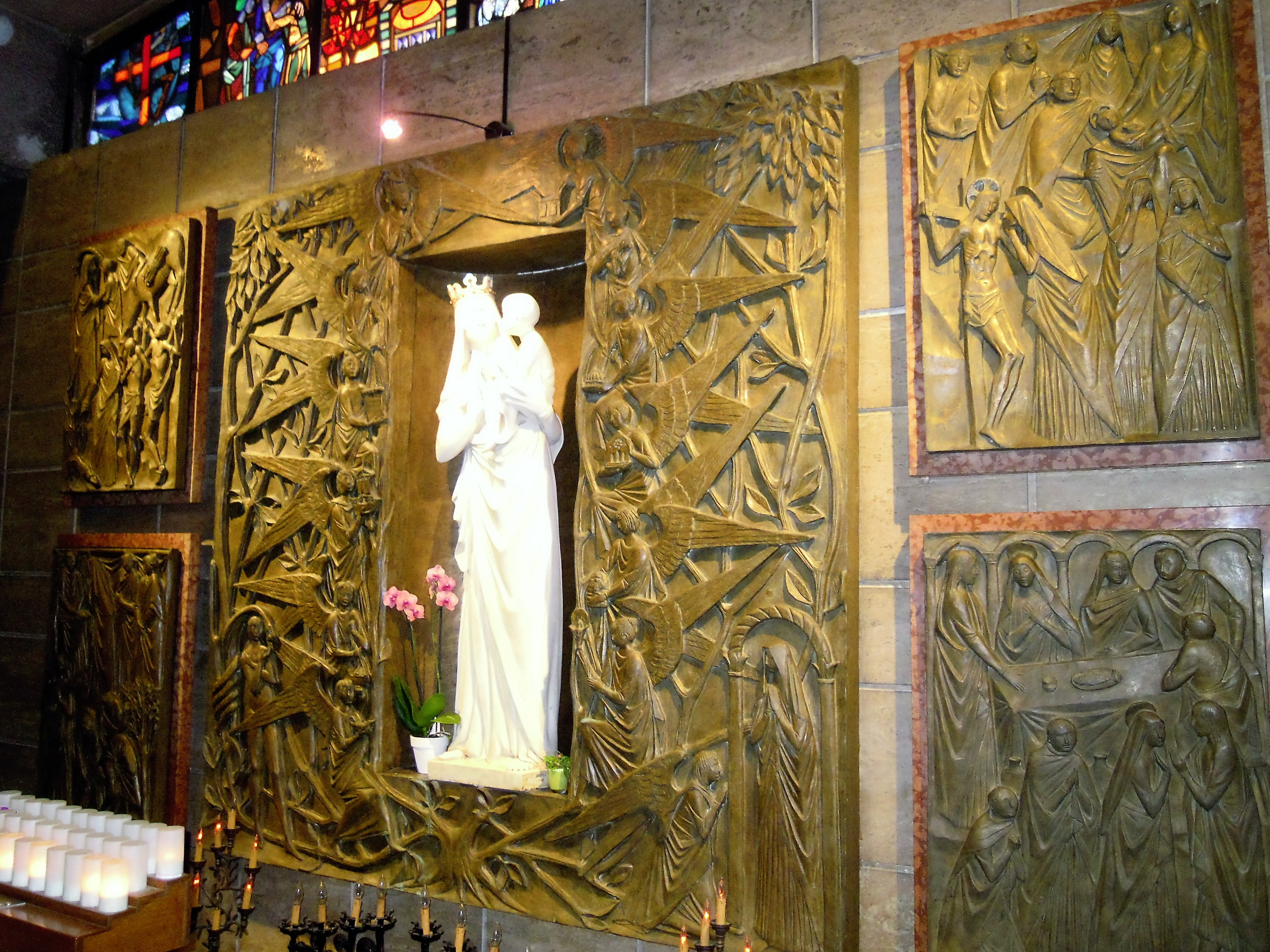 Roma, monumento a Maria nella chiesa di Nostra Signora del Santissimo Sacramento e dei Santi martiri canadesi (quartiere Nomentano)